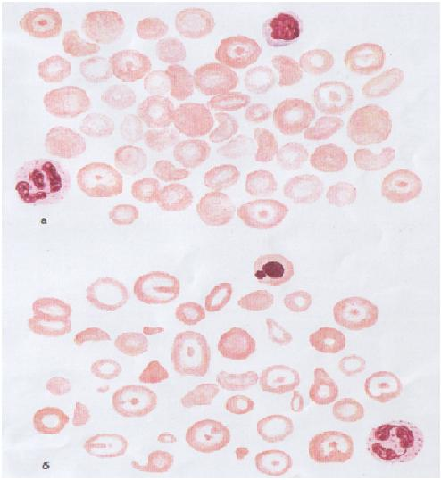 Талассемия кезіндегі қан: а – кіші талассемия; б – үлкен талассемия